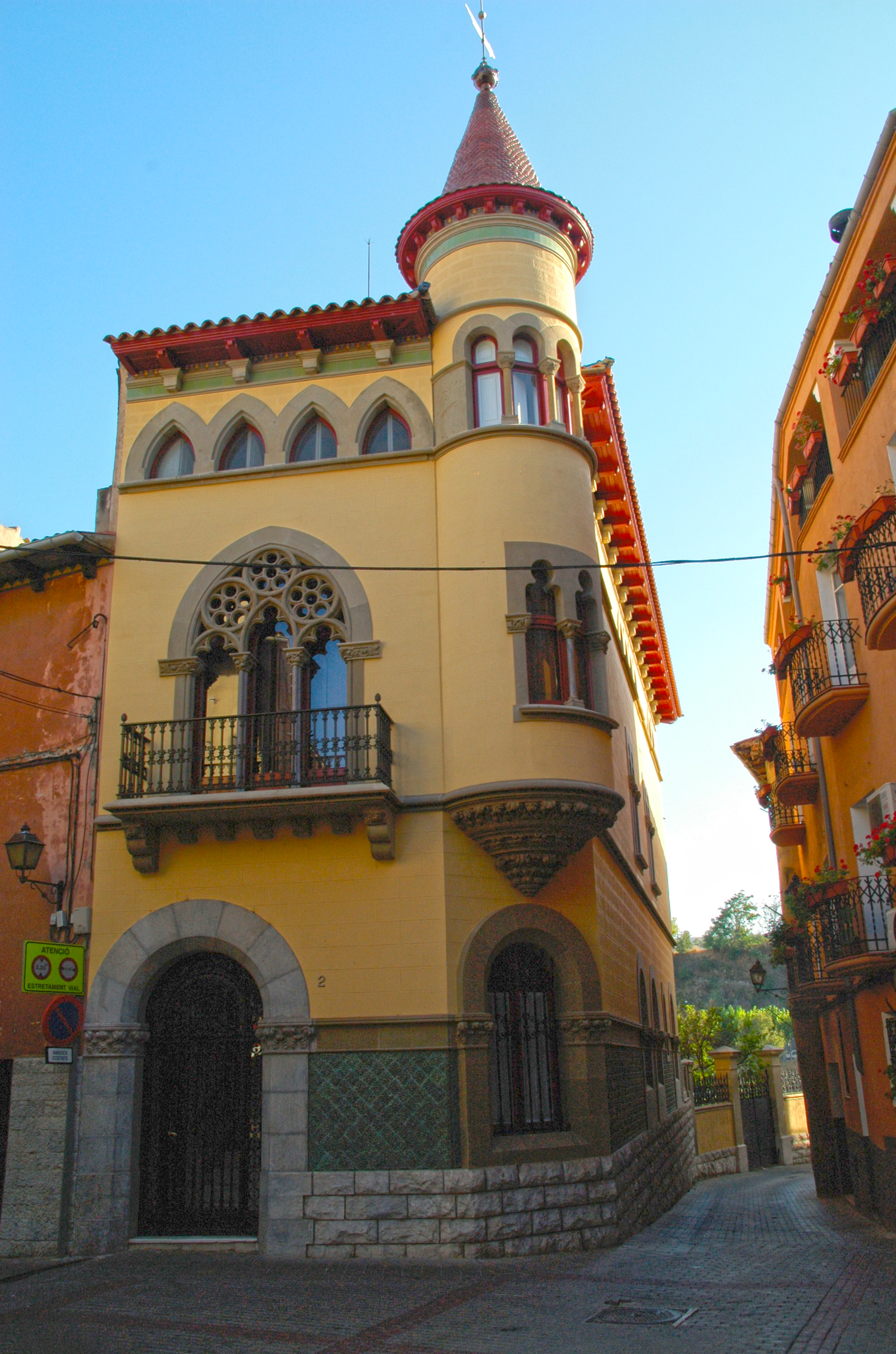 Torre de Ca l'Arau de Sallent en el carrer Sant Bernat, Modernisme XX Inici